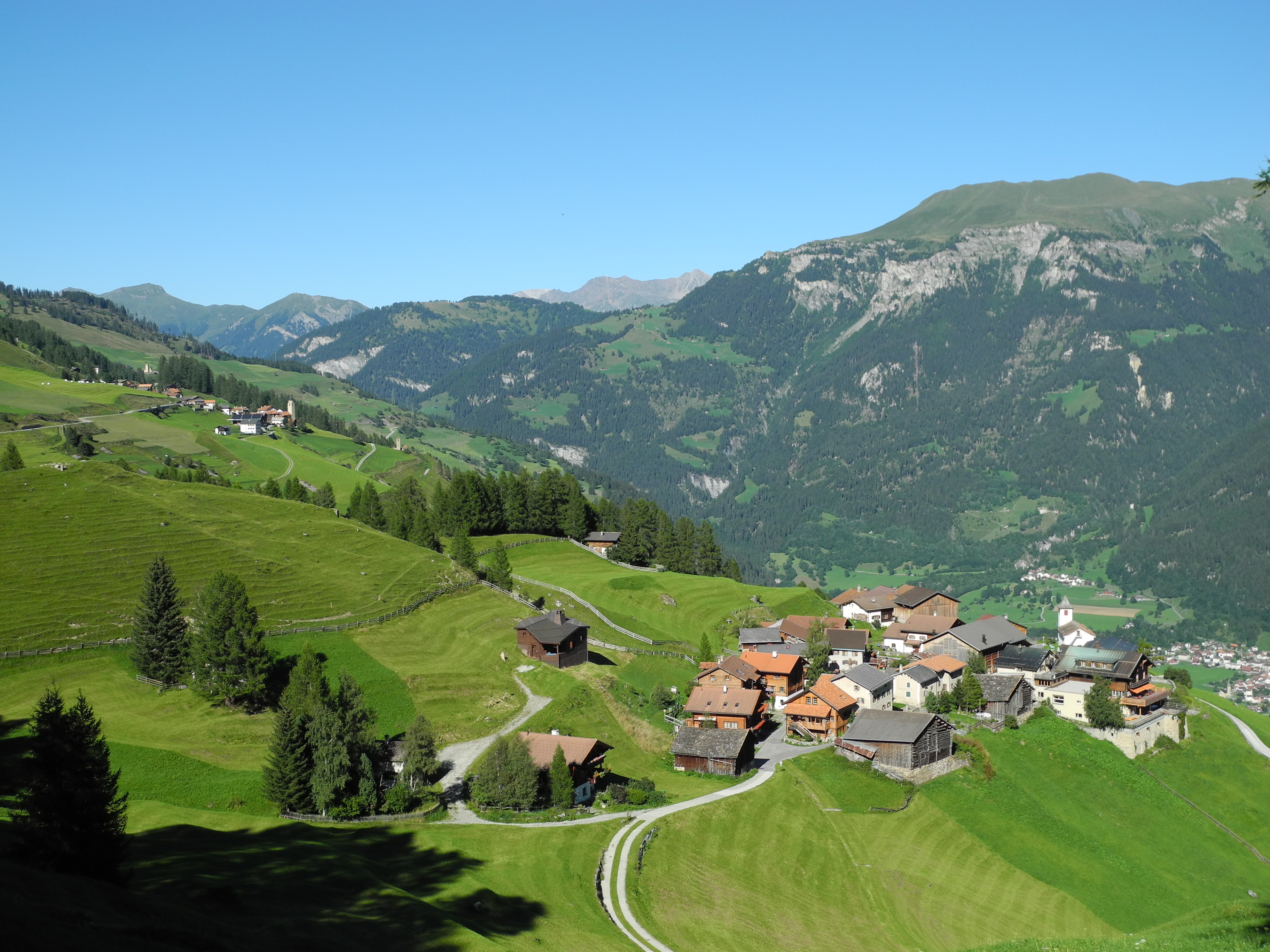 Wergenstein